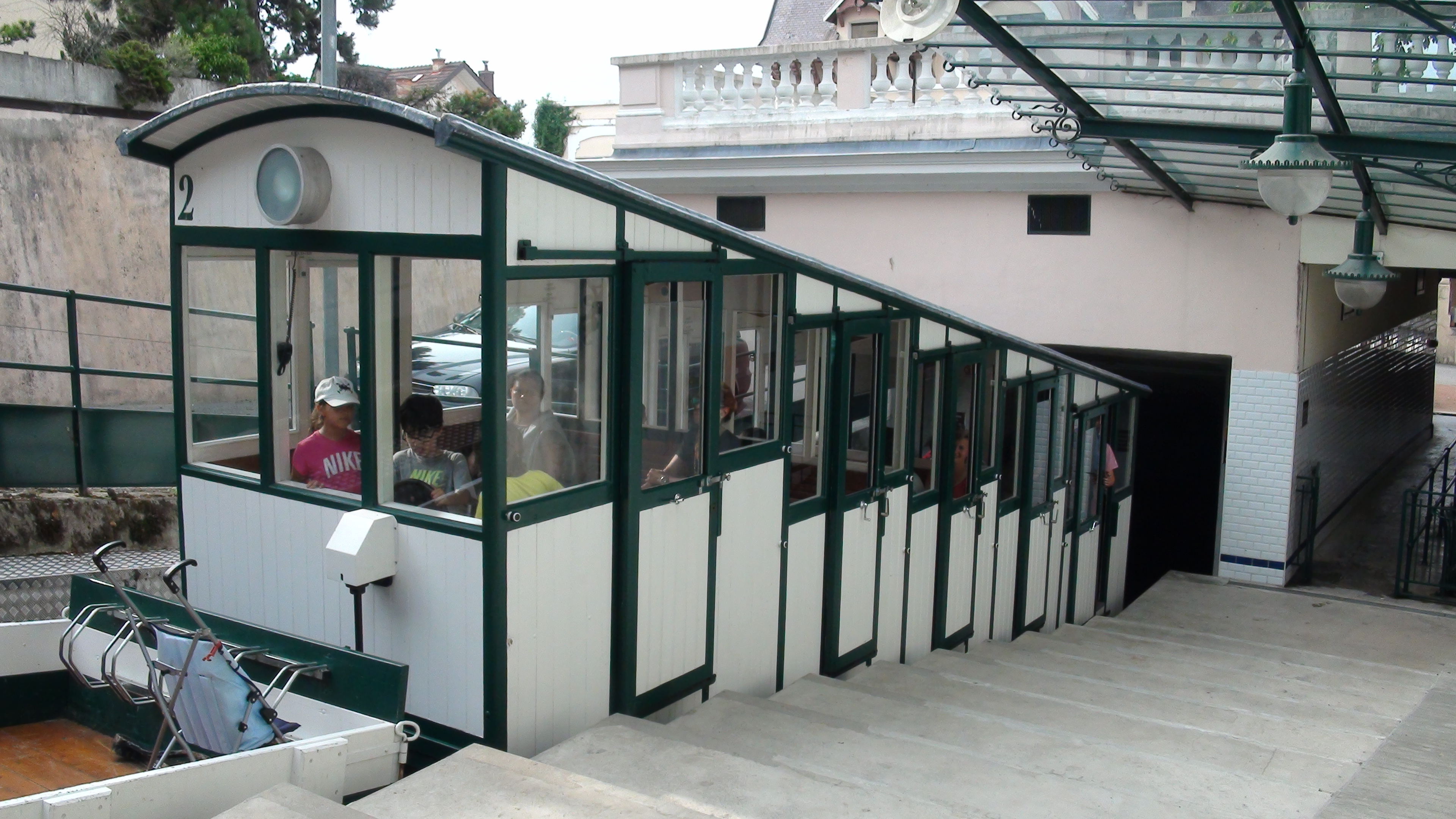 74500 Évian-les-Bains, France